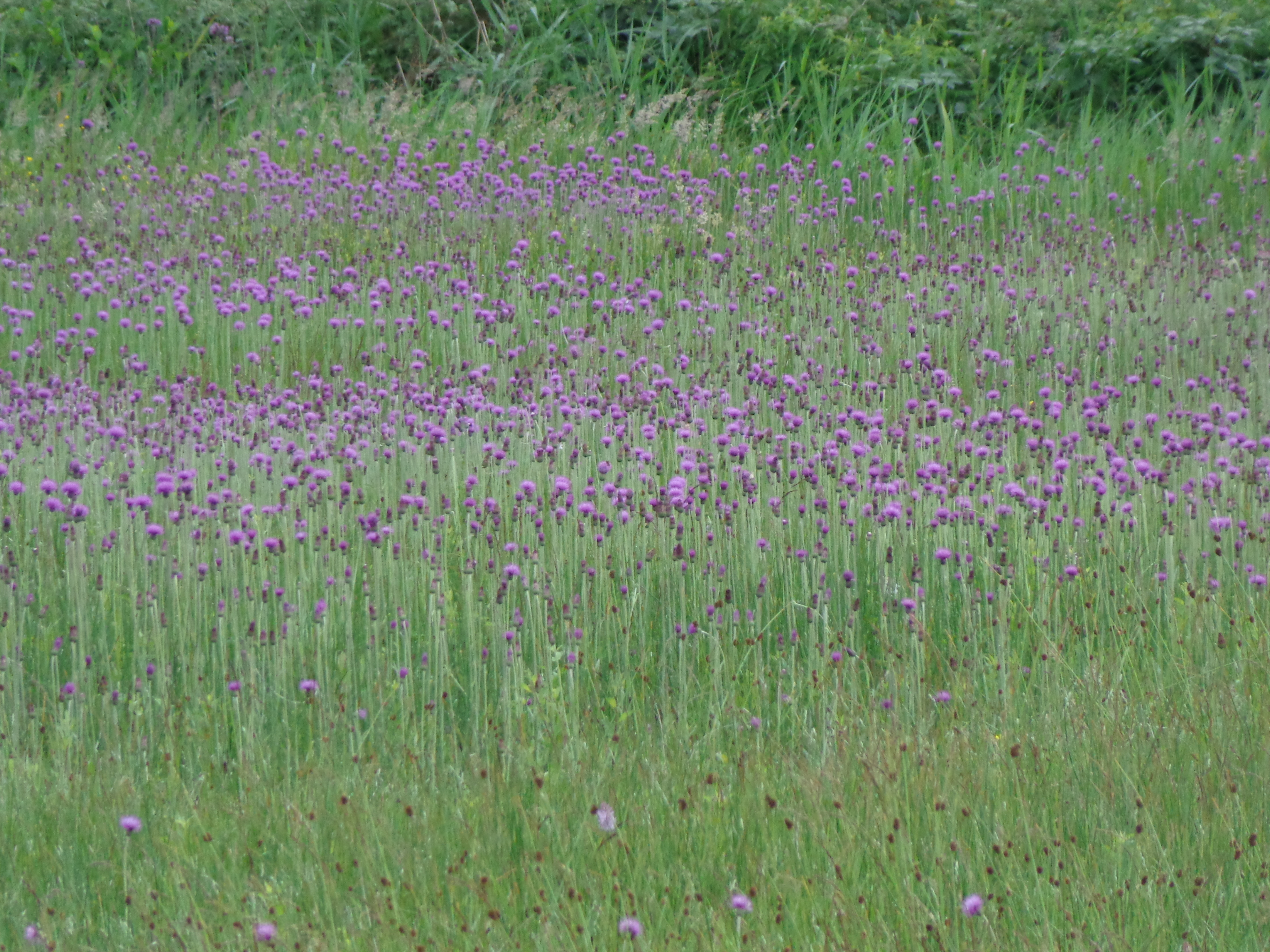 Blauwgrasland met Spaanse Ruiter (Cirsium dissectum) op natuurterrein Groot Zandbrink